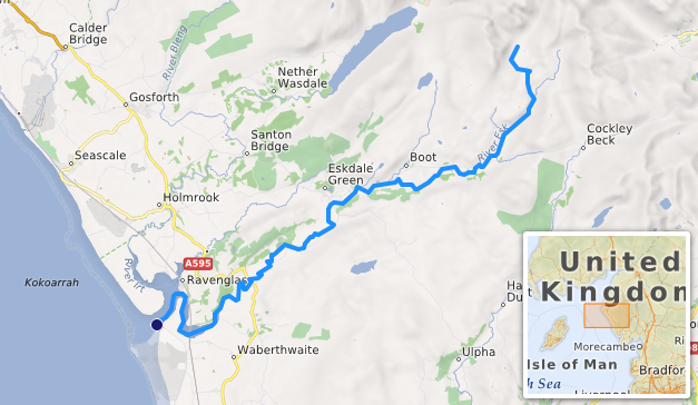 carte réalisée sur umap [1] This map may be incomplete, and may contain errors. Don't rely solely on it for navigation.